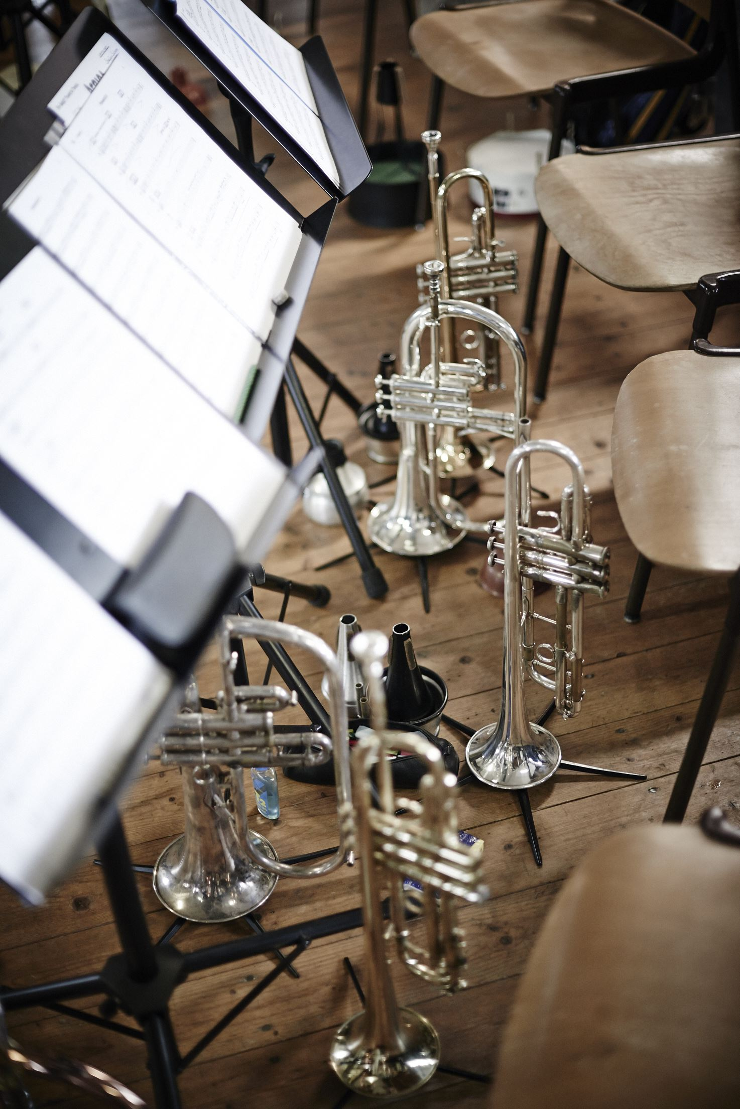 Zurich Jazz Orchstra